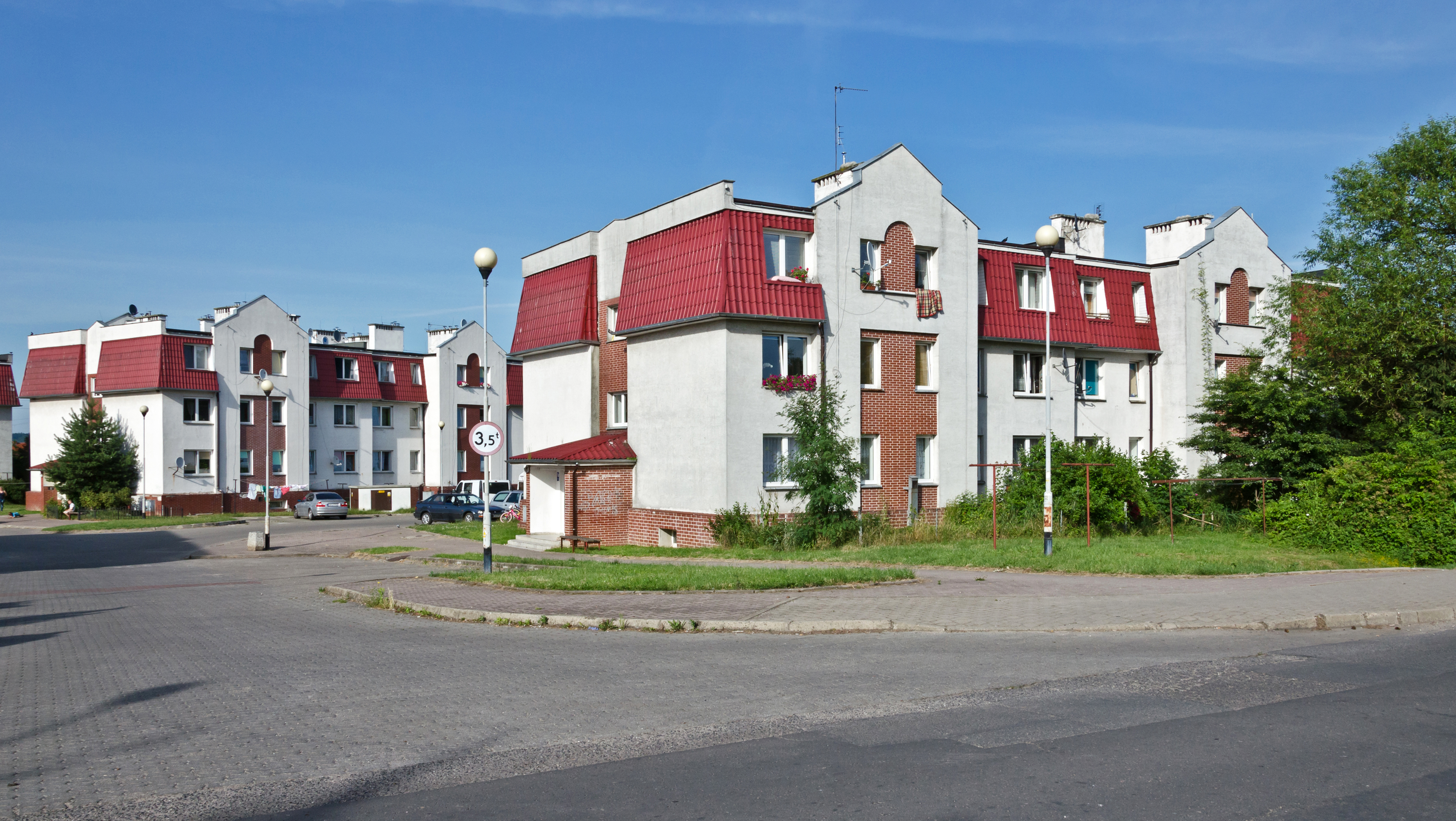 Kłodzko, ul. Korytowska